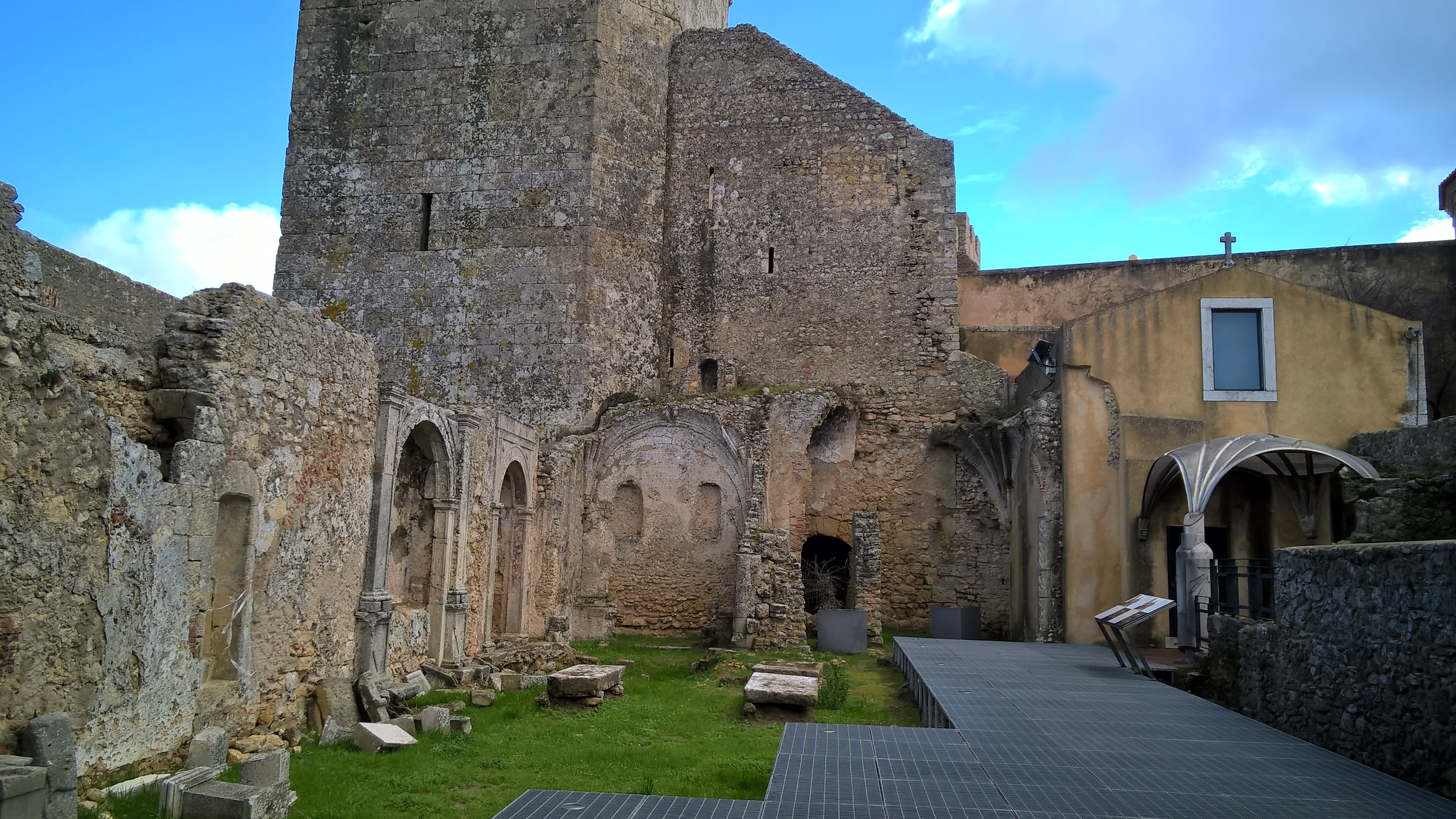 Igreja de Santa Maria (em ruínas) no Castelo de Palmela, vista do altar mor ao fundo, a sacristia recuperada do lado direito e a Torre de Menagem ao alto do lado esquerdo.